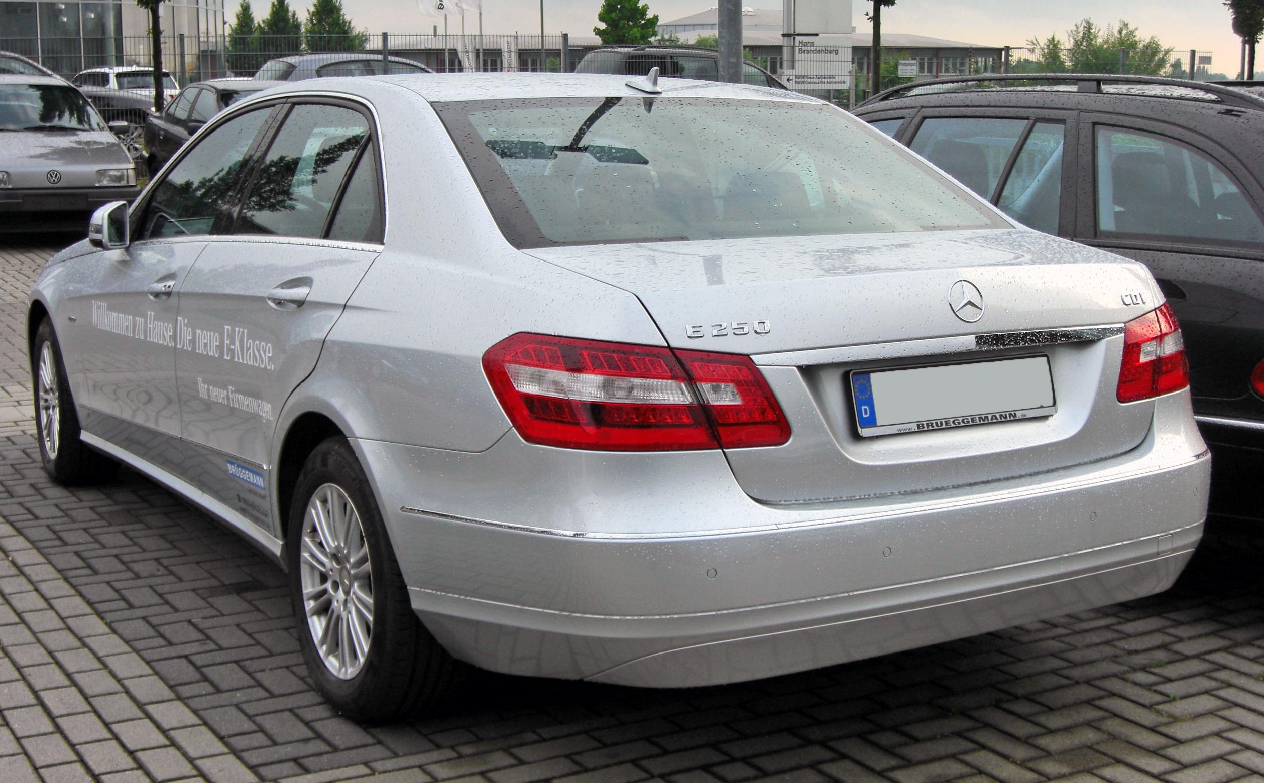 Mercedes E 250 CDI